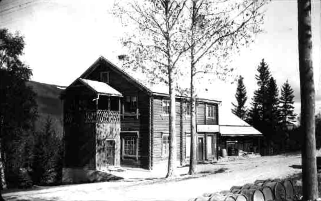 Unset S-lag ca. 1935-1940